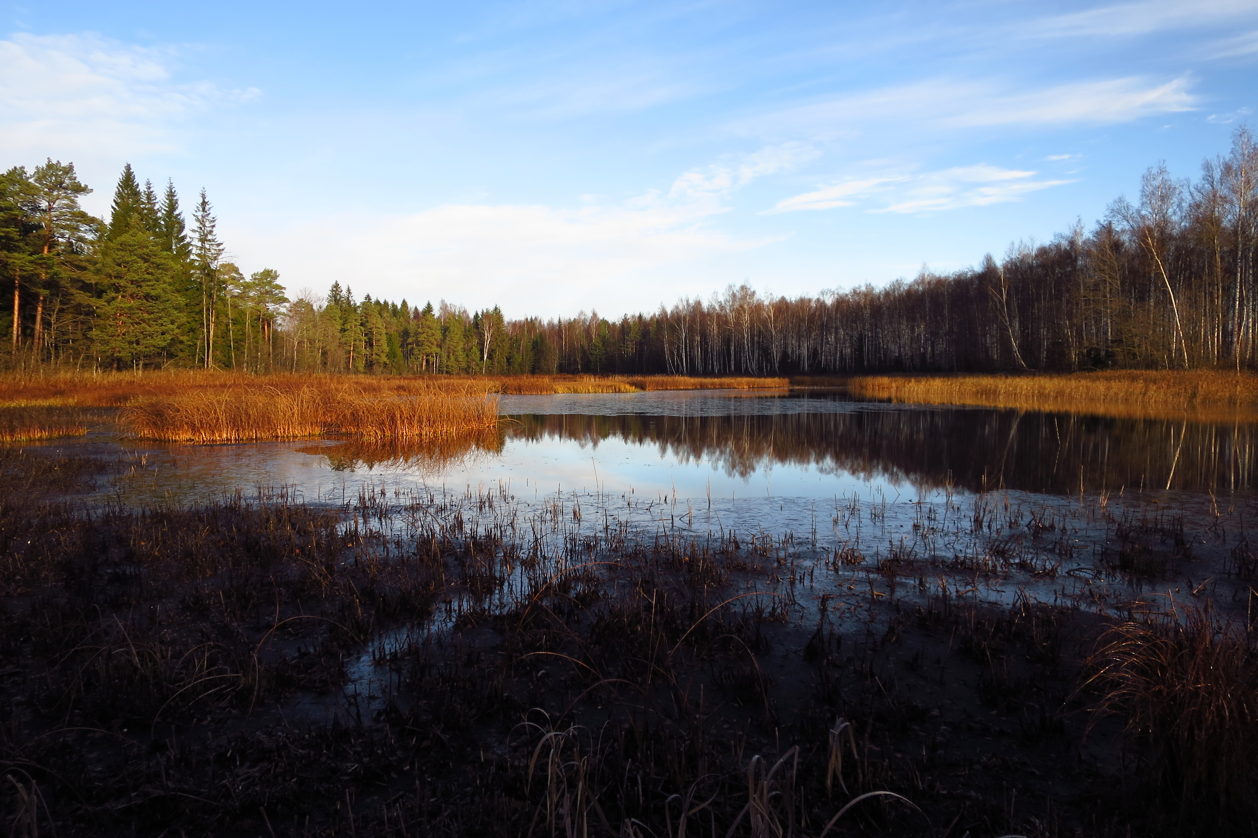 Kurtna Kastjärve lõunakaldal